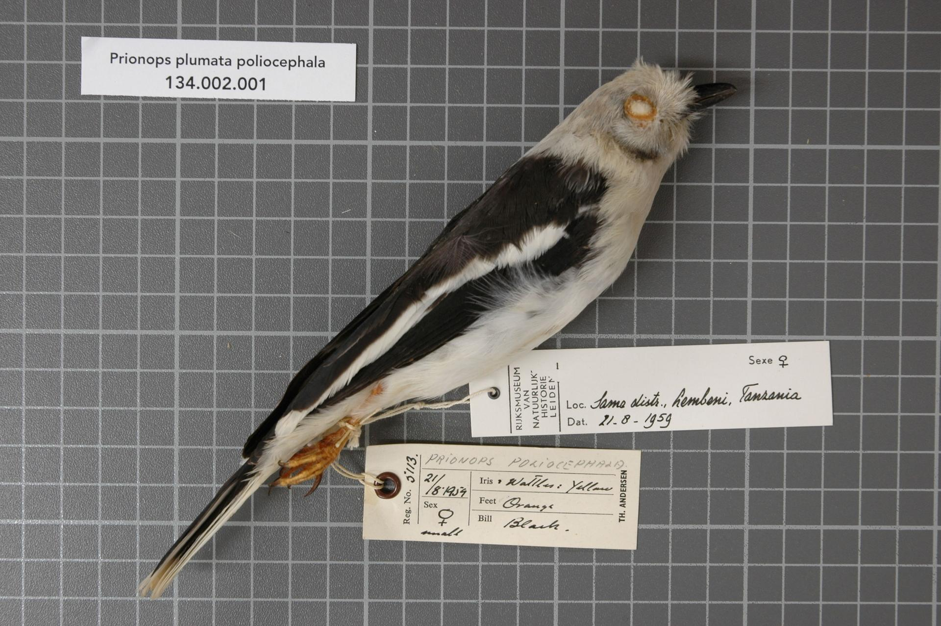 Prionops plumata poliocephala (Stanley, 1814)